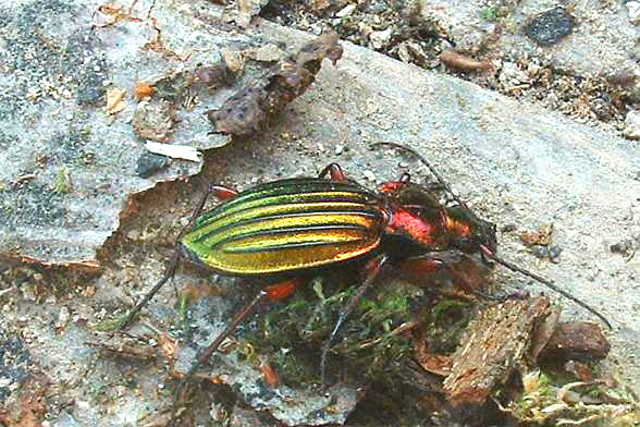 Carabe à reflet cuivré de l'espèce Carabus auronitens, Vantoux-et-longevelle